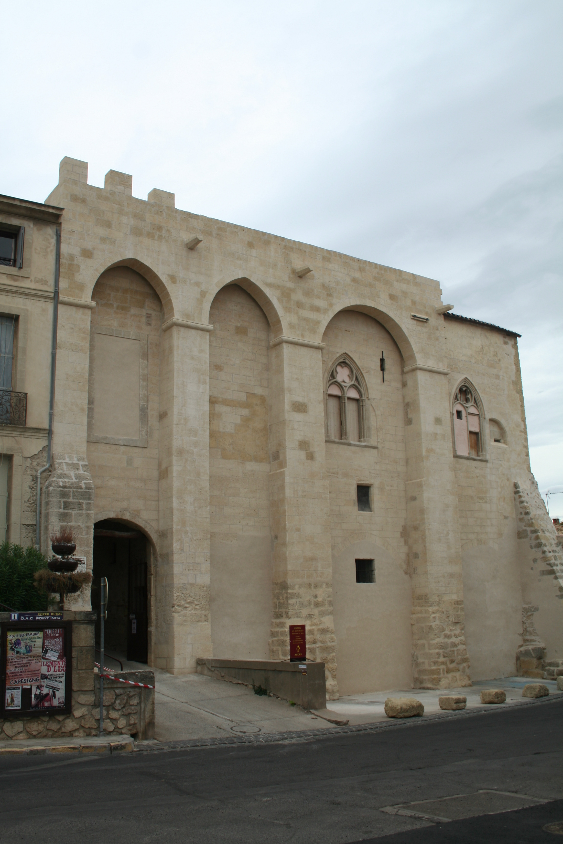 Capestang (Hérault) - Château des archevêques de Narbonne, façade extérieure